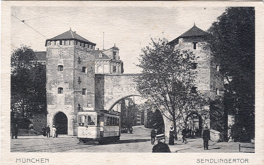 Postkarte, datiert 7.7.1918. Beschriftung: "München - Sendlinger Tor".